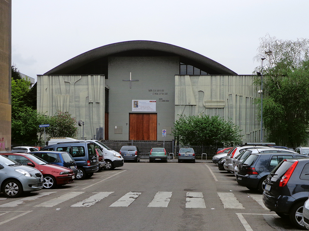 Milano, chiesa di San Giovanni Bosco. Fu costruita dal 1966 al 1967 su progetto di Mario Tedeschi e Carlo Ramous.Fonte: Cecilia De Carli (a cura di), Le nuove chiese della diocesi di Milano. 1945-1993, Milano, Edizioni Vita e Pensiero, 1994, p. 199, ISBN 88-343-3666-6.